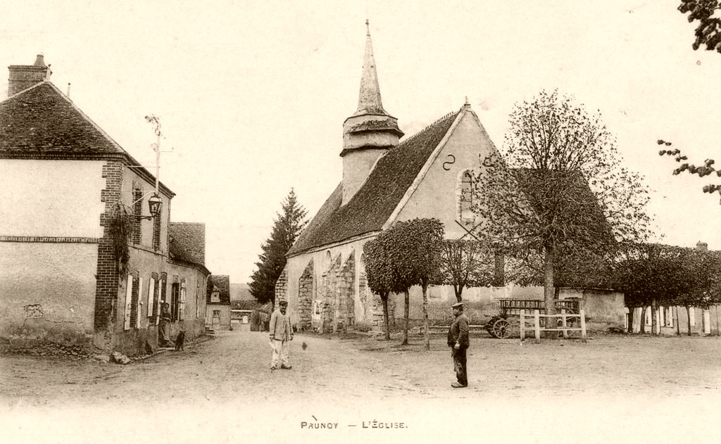 Carte postale de l'église de Prunoy (Yonne, France) , avant sa démolition en 1929.